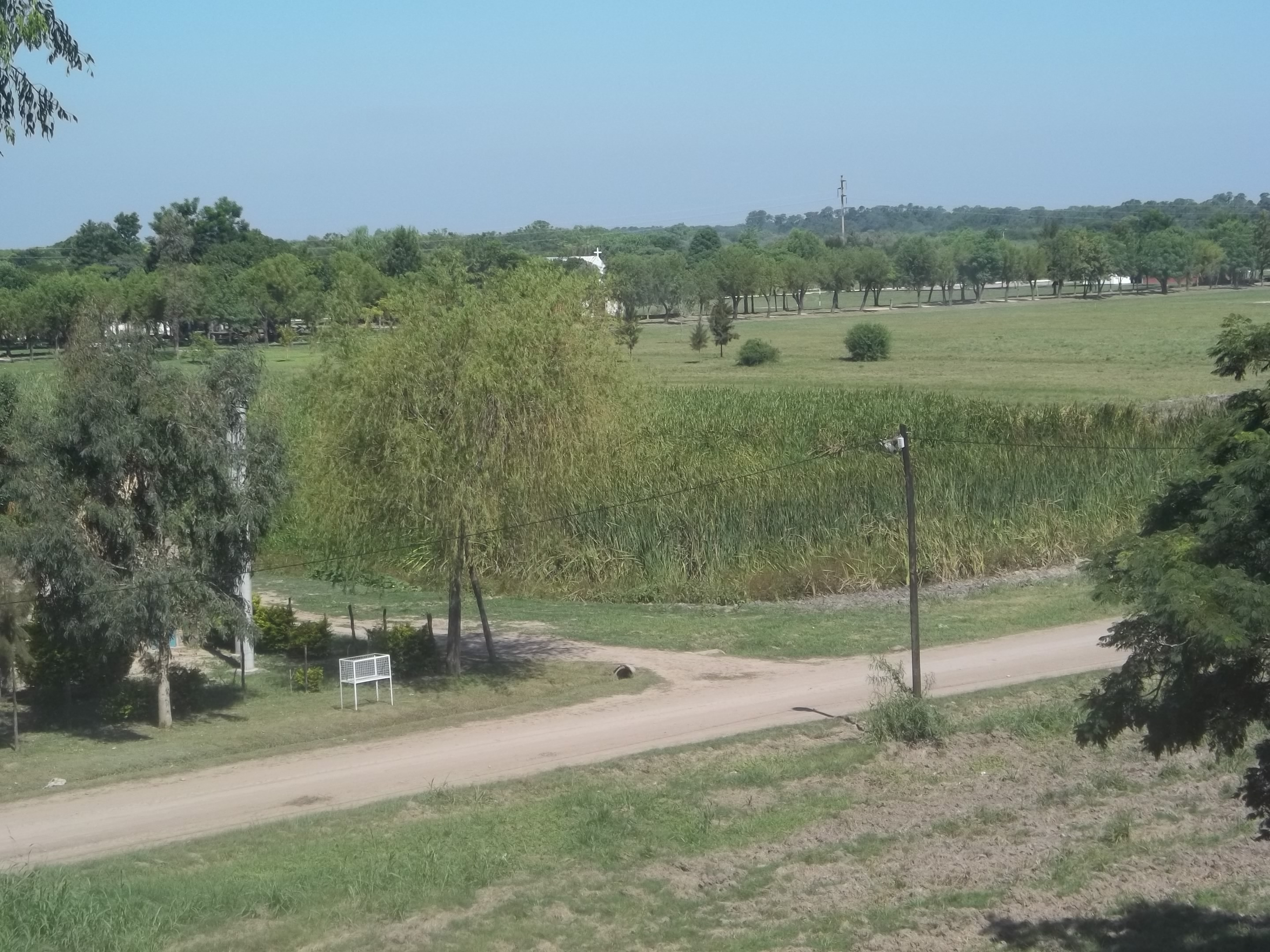 Vista a la capilla católica de Puerto Eva Perón (Chaco, Argentina) desde la Ruta Nacional 11.